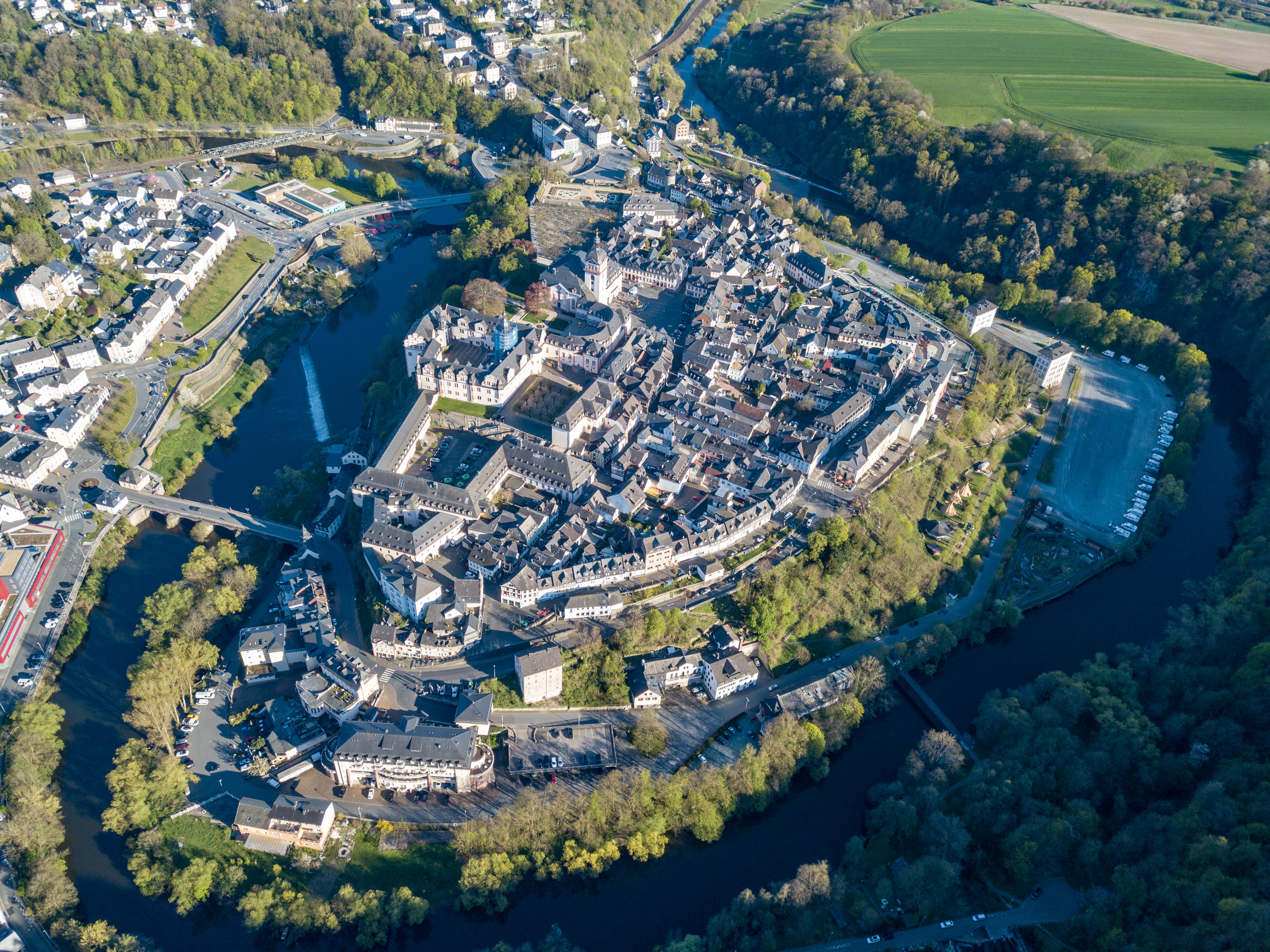 Luftbild Weilburg